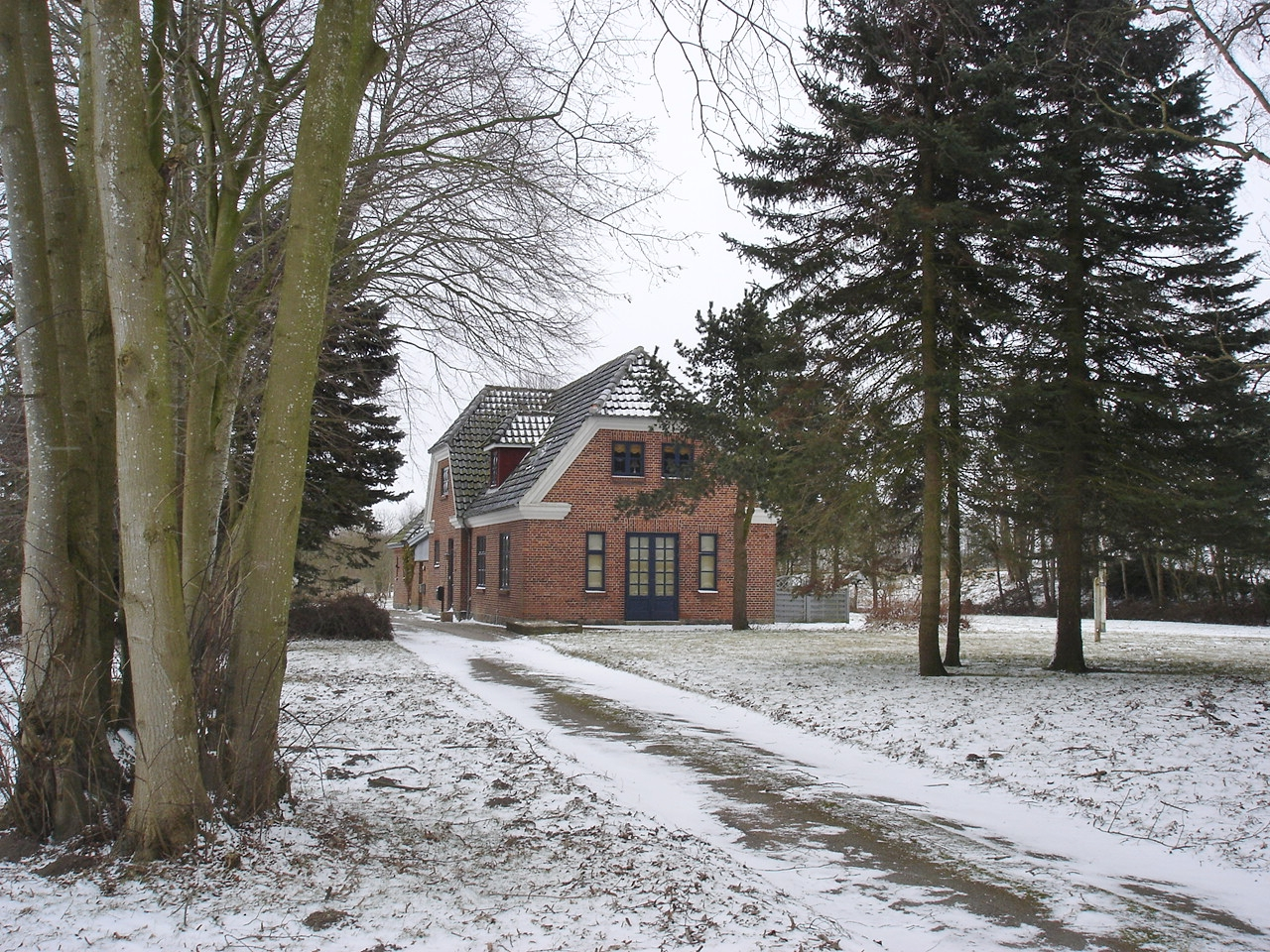 Kustrup Station